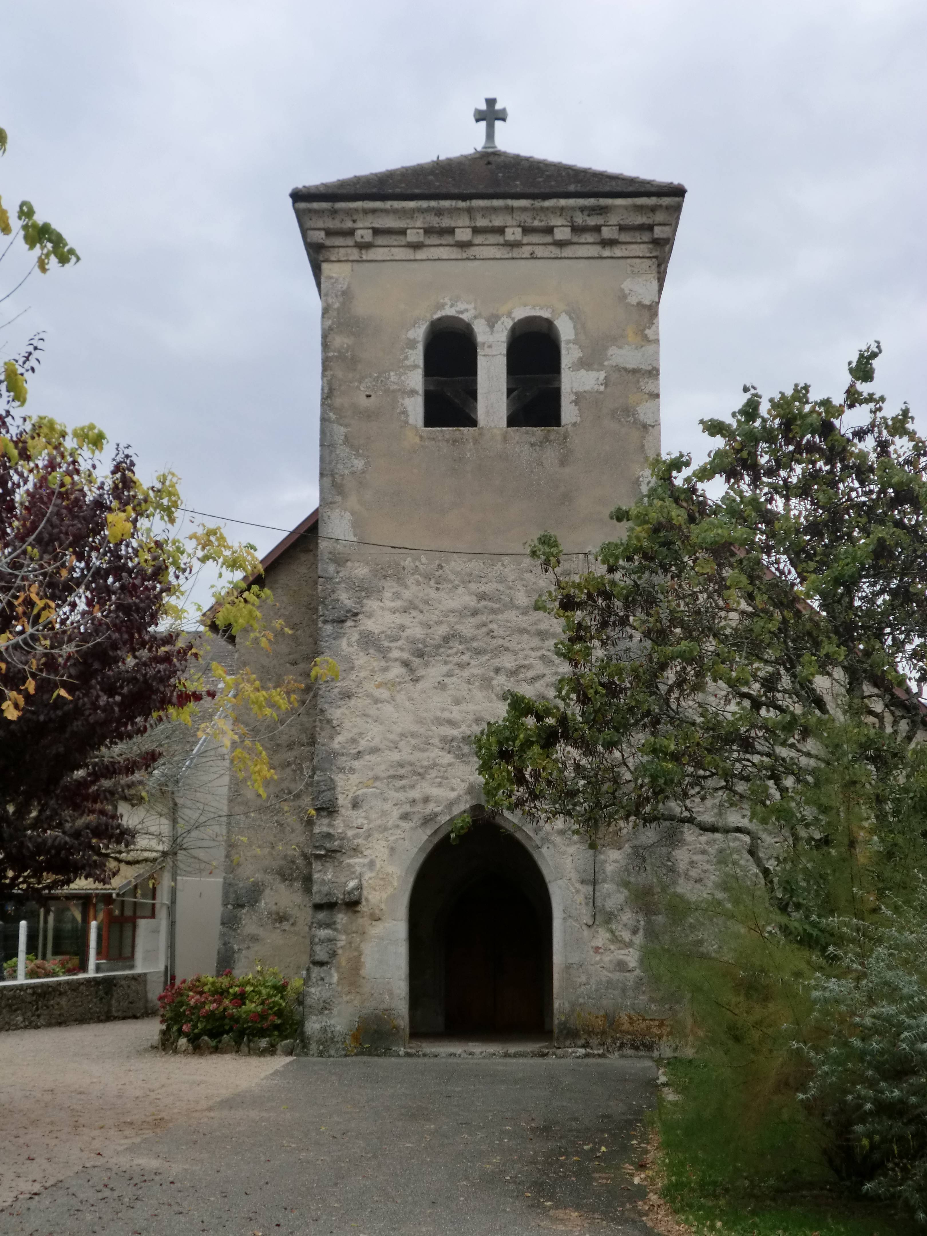 Église du village de Belmont dans la commune de Belmont Luthézieu